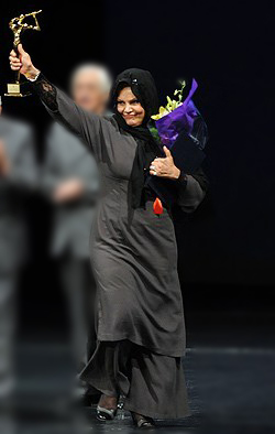 شهلا میلانی اختتامیه دوازدهمین جشن خانه موسیقی ۱۳۹۰/۷/۲۱